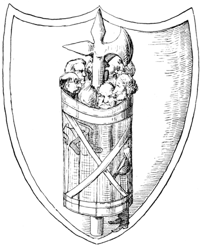 Orginalunterschrift/Original caption: «Der Frieden von Gallörien, dargestellt im neugeflickten und frisch geschnürten St. Gallerwappen». Karikatur auf die Verhältnisse im Kanton St. Gallen nach dem Verfassungsstreit 1861/Caricature about the Compromise constitution of the Canton of St. Gallen 1861